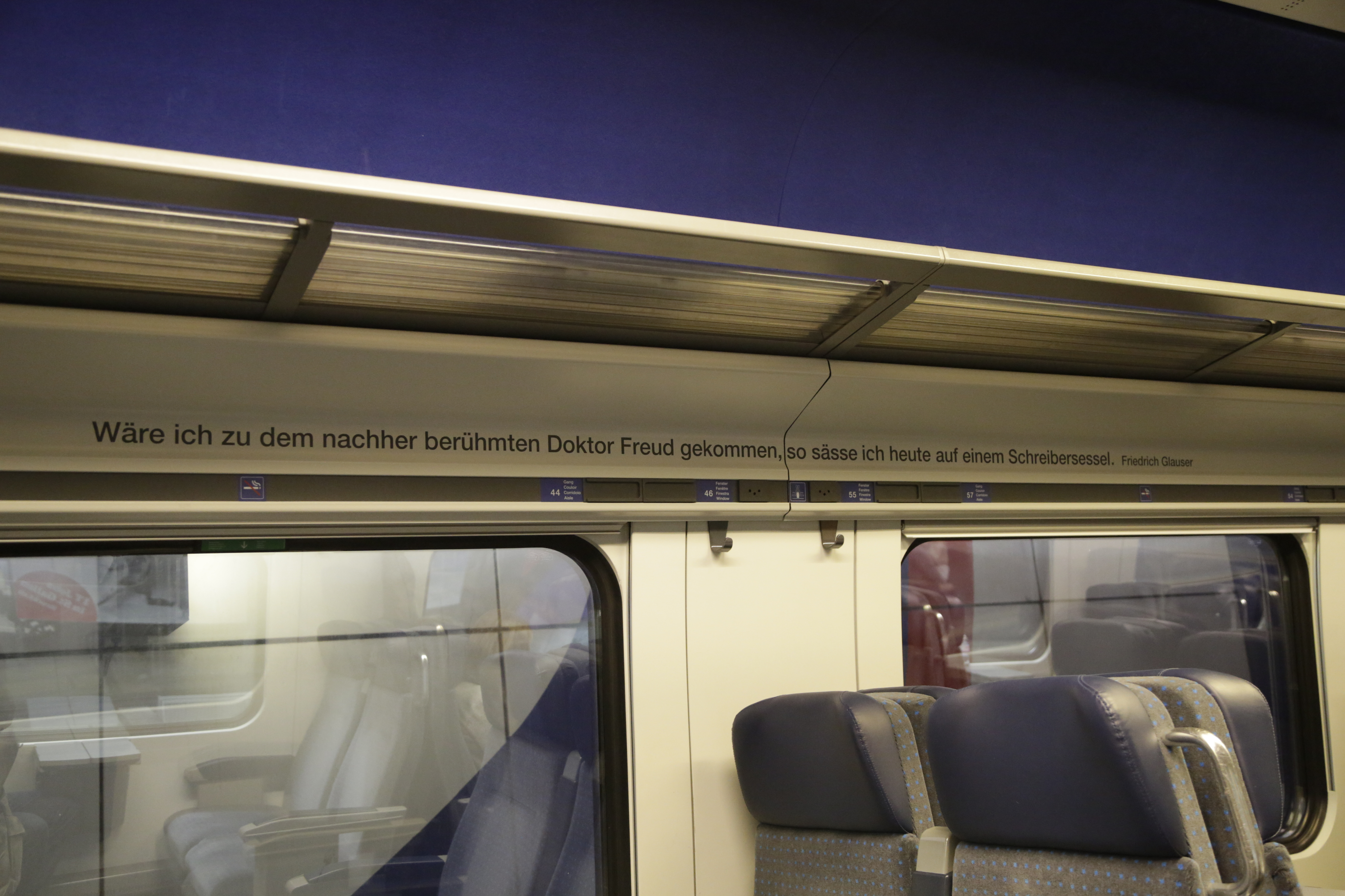 Innenaufnahmen aus dem ICN (SBB RABDe 500) 019. Dieser hat als Namensträger Friedrich Glauser, und es finden sich deshalb diverse Zitate von ihm in Innern.